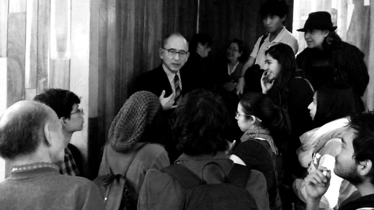 「スペイン語で詠う小倉百人一首」の翻訳出版についての講演にて。メキシコ国立自治大学